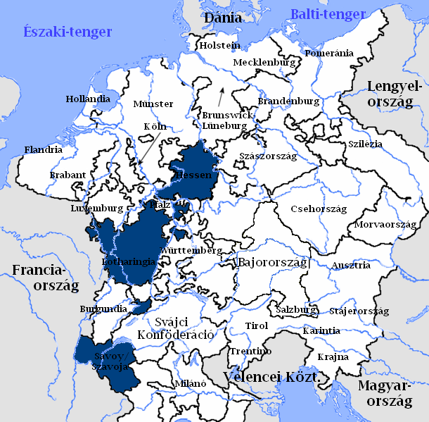 A Felső-rajnai körzet a Német-római Birodalomban